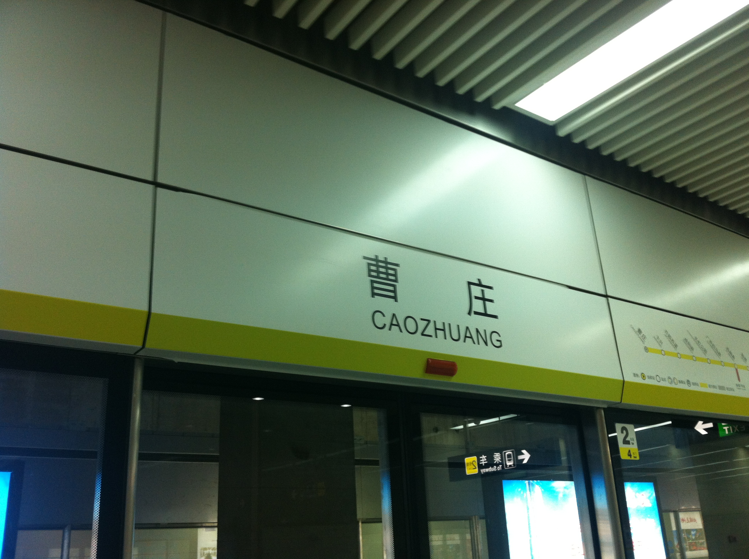 中文（中国大陆）: 天津地铁二号线曹庄站